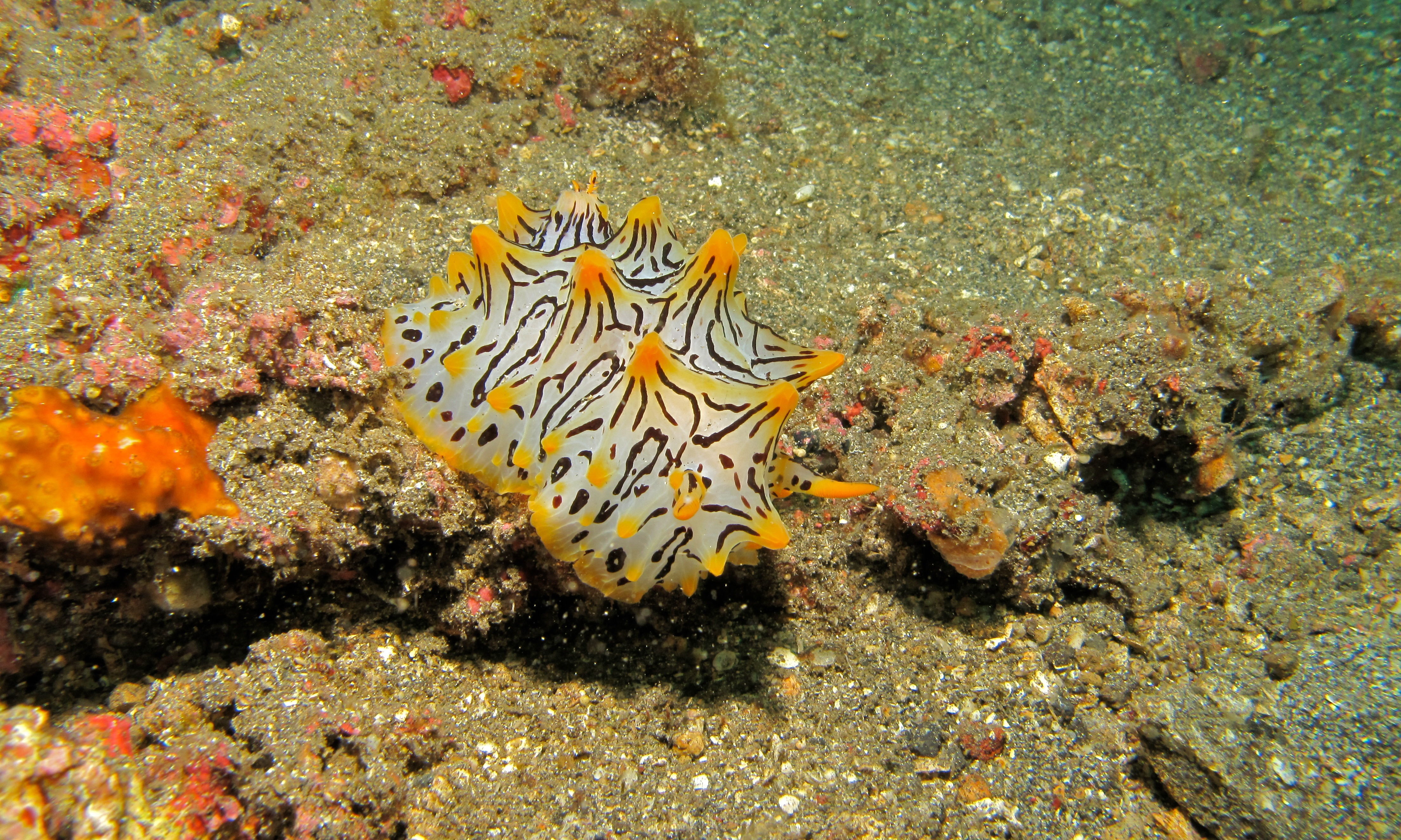 Makawide Island, Lembeh Strait, Sulawesi, INDONESIA